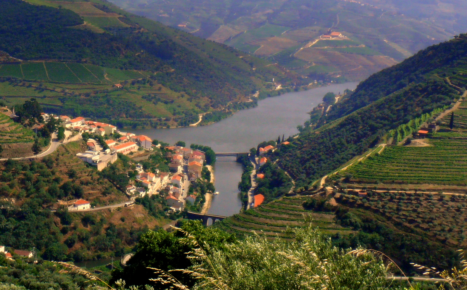 Alto Douro